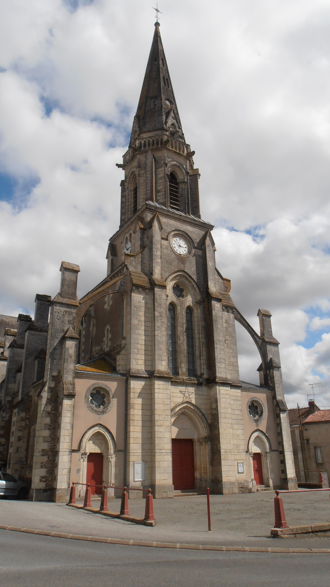 L'église du village du Fuilet (Maine-et-Loire, France). Église du XIXe siècle, néo-gothique.